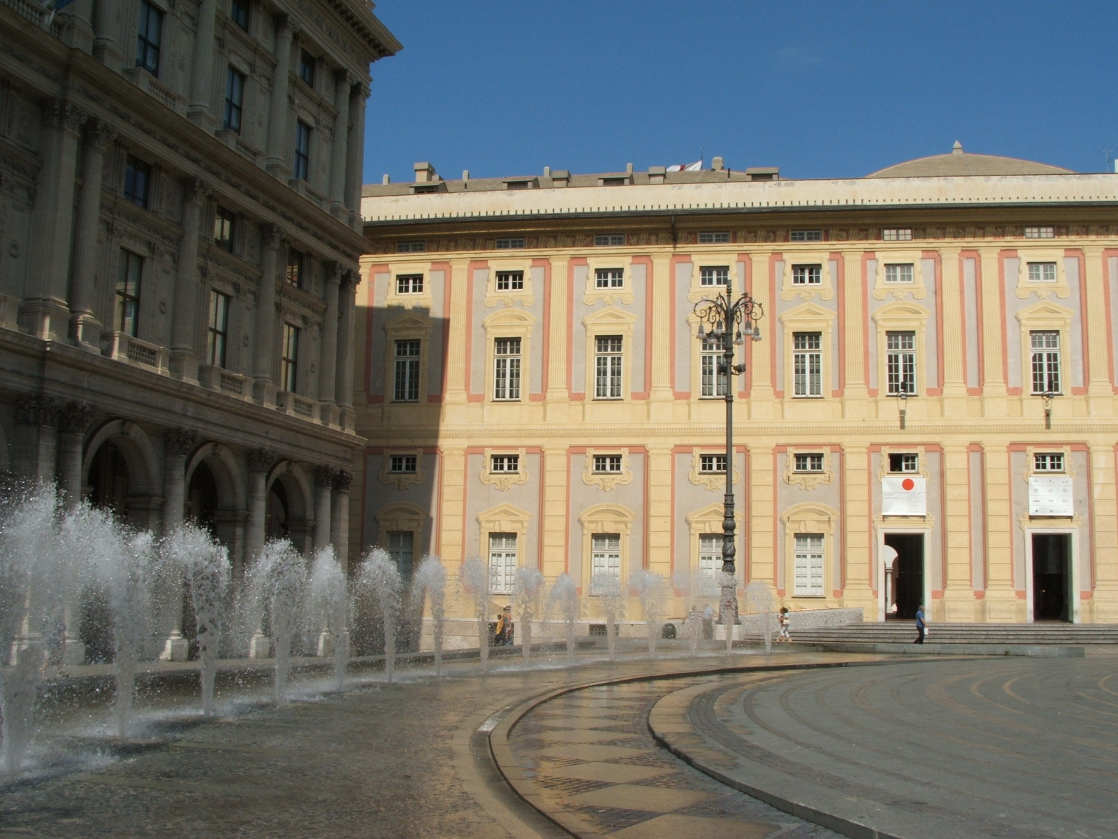 Immagine dalla città di Genova Piazza De Ferrari - Palazzo Ducale